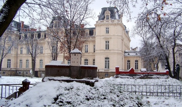 Парк замків та оборонних споруд взимку: Парк замків та оборонних споруд давньої України під першим снігом на фоні Палацу Потоцьких